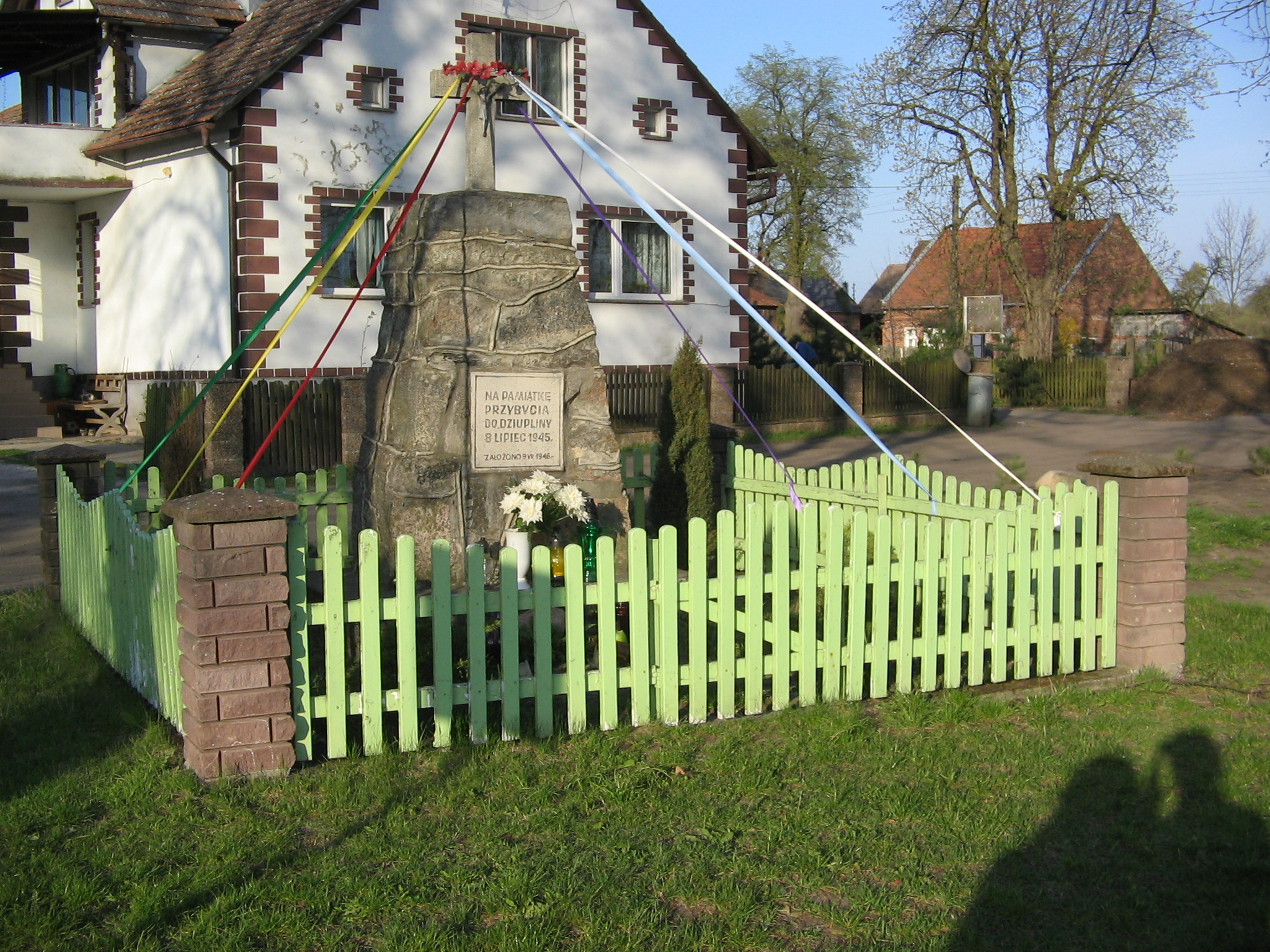 Krzyż upamętniający przybycie w 1945r